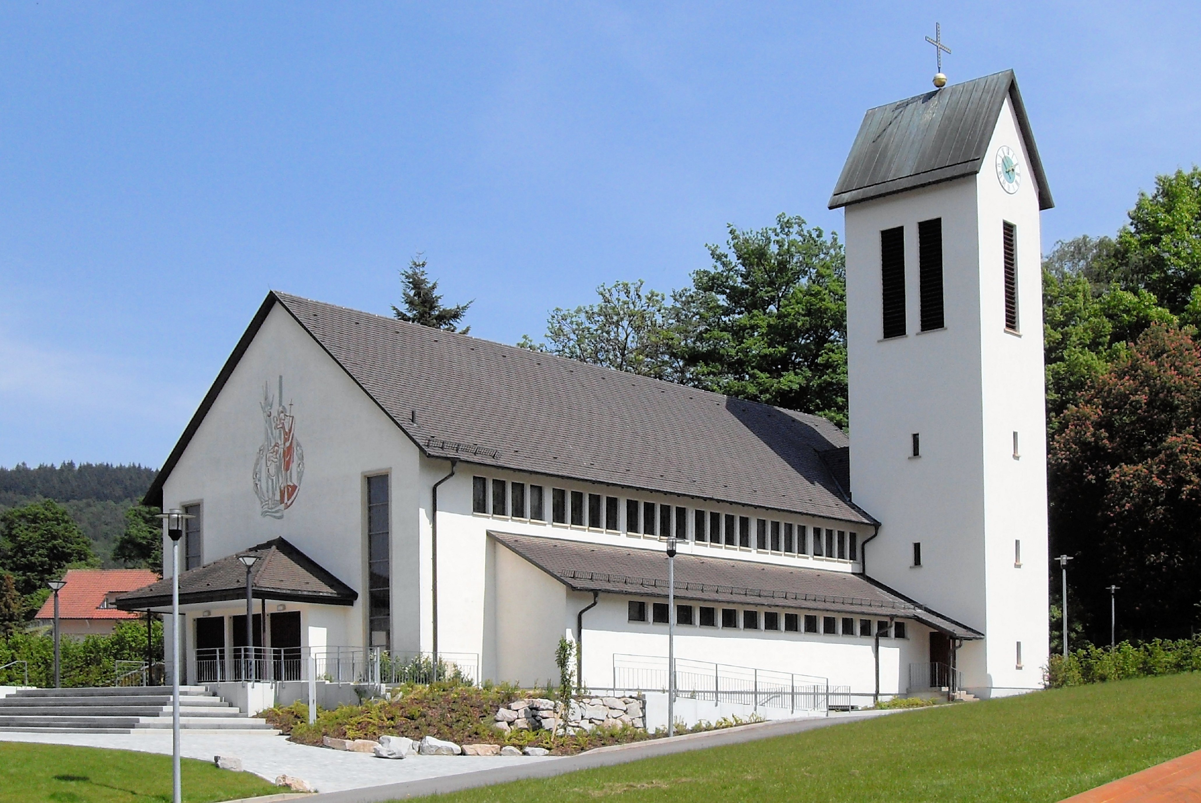 Sankt-Johannes-Kirche in Au bei Freiburg